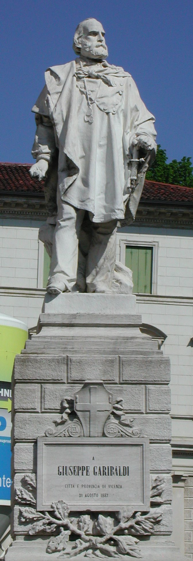 Statua di Giuseppe Garibaldi a Vicenza Source: photo uploaded by User:RicciSpeziari. Photographer: Riccardo Speziari